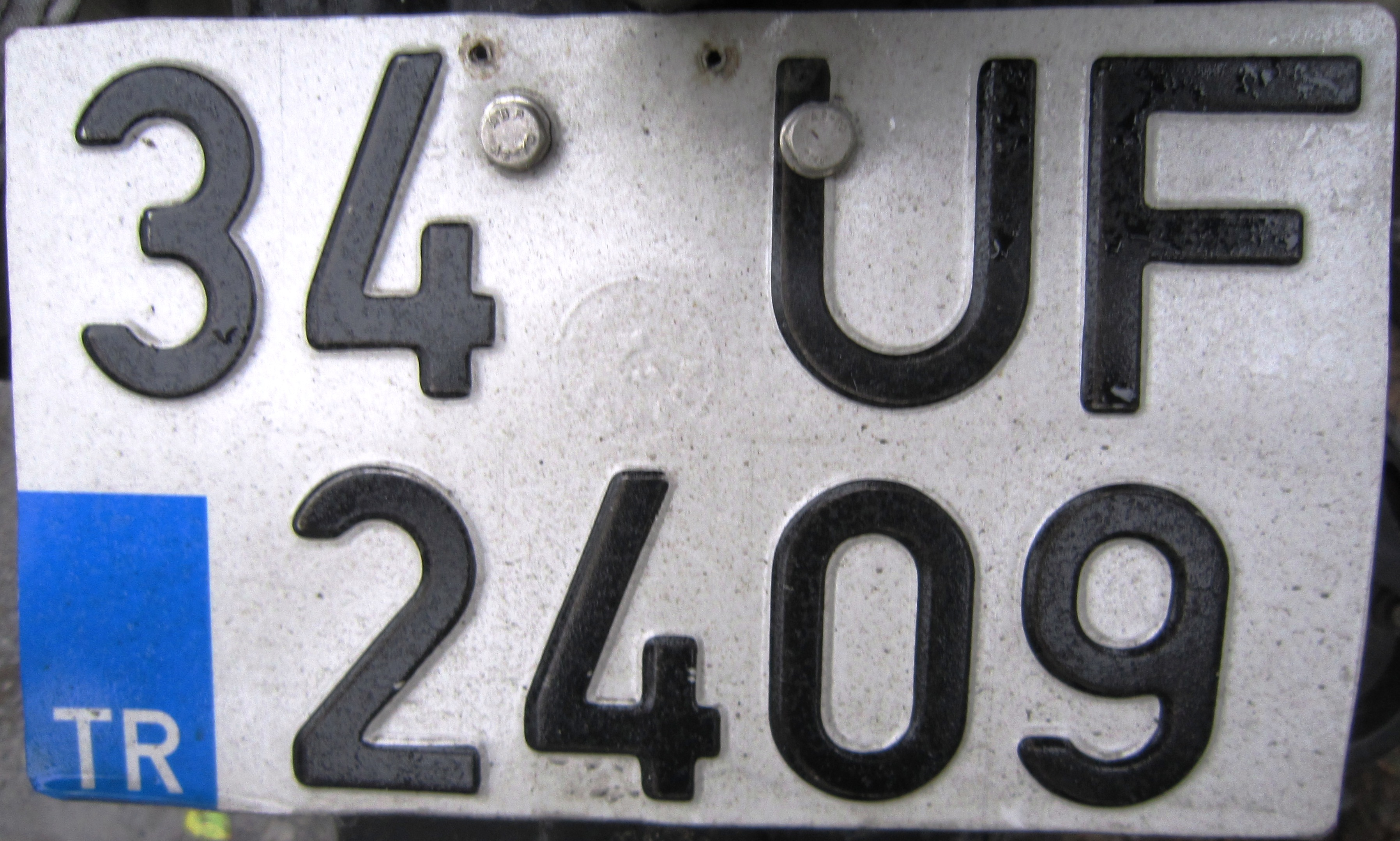 motorfiets kentekenplaat (34 - Istanboel) Turkije